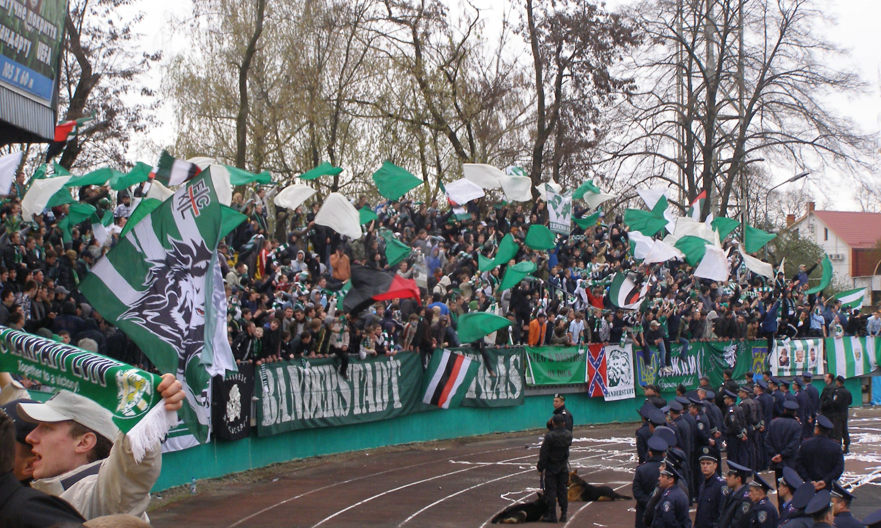 Sakarpattja Uschhorod - Karpaty Lwiw. Karpaty Lwiw fans in dem Avanhard-Stadion (Uschhorod)